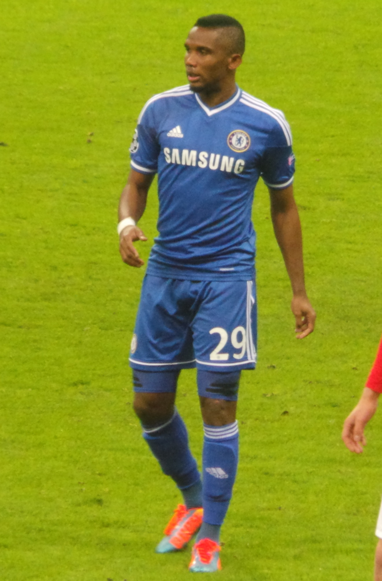 Samuel Eto'o